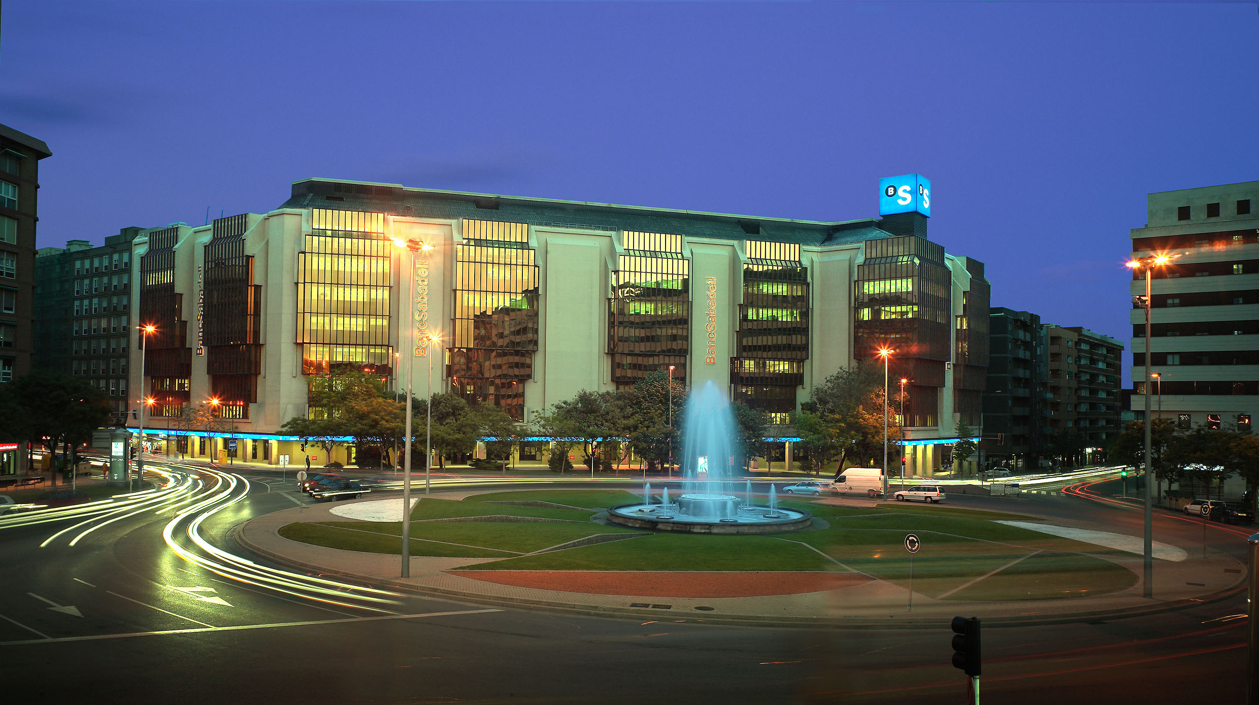 Edificio Corporativo Banco Sabadell en Sabadell